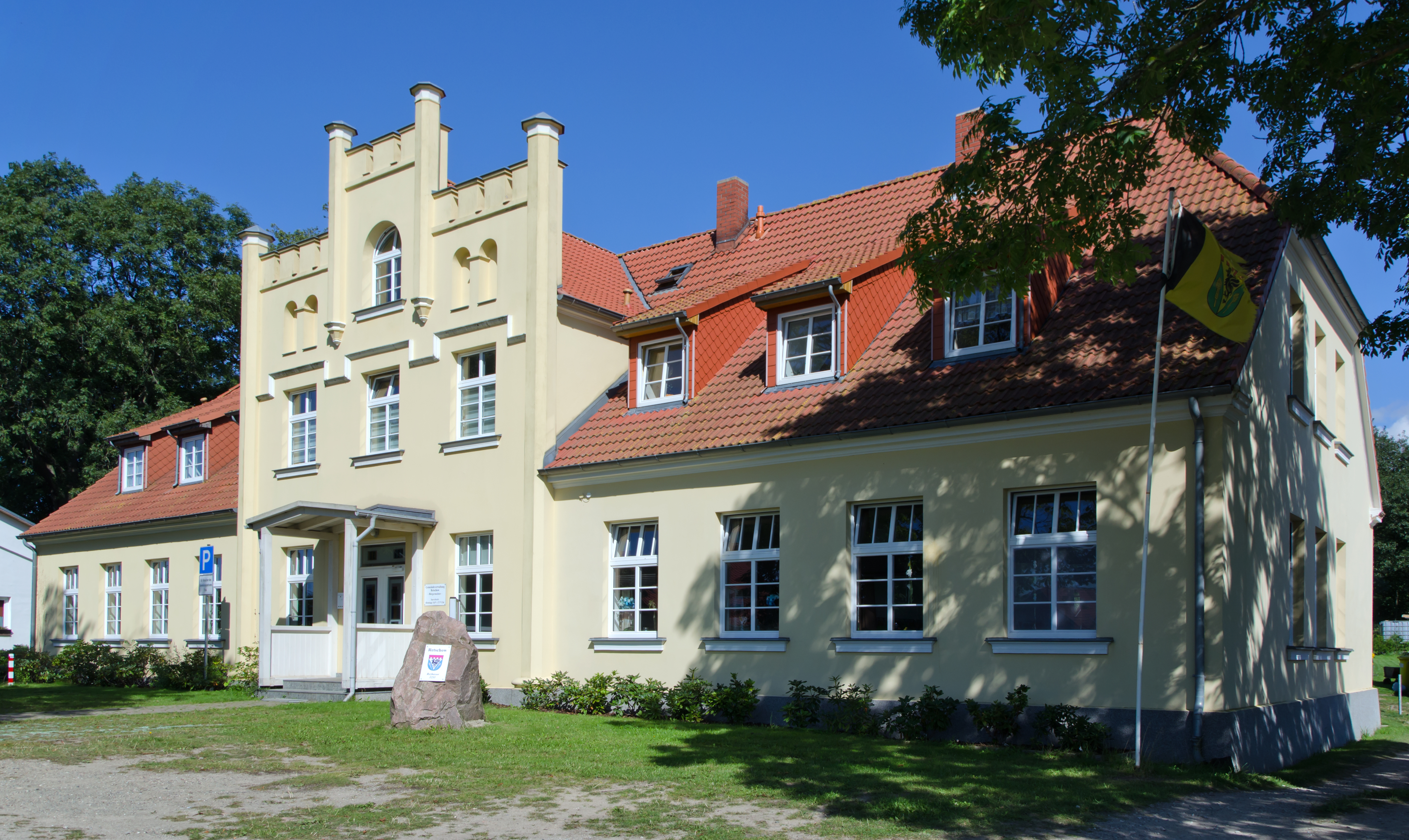 Haus der Gemeindeverwaltung Retschow